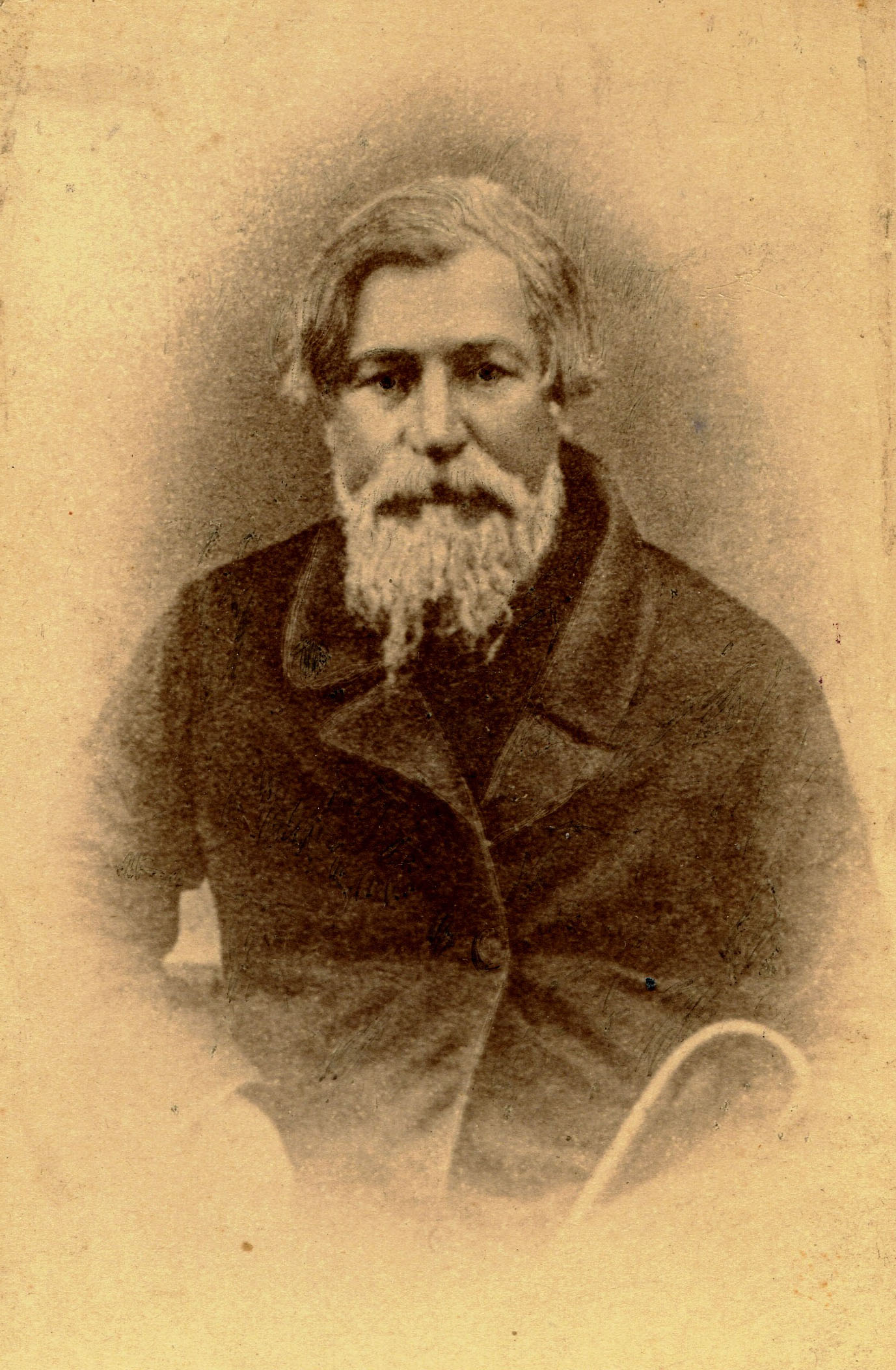 Сажин Н.Н., Муром. Портрет городского головы Владимира Васильевича Гундобина. Фотокопия 1890-х гг. с живописного портрета. Место хранения: Муромский музей